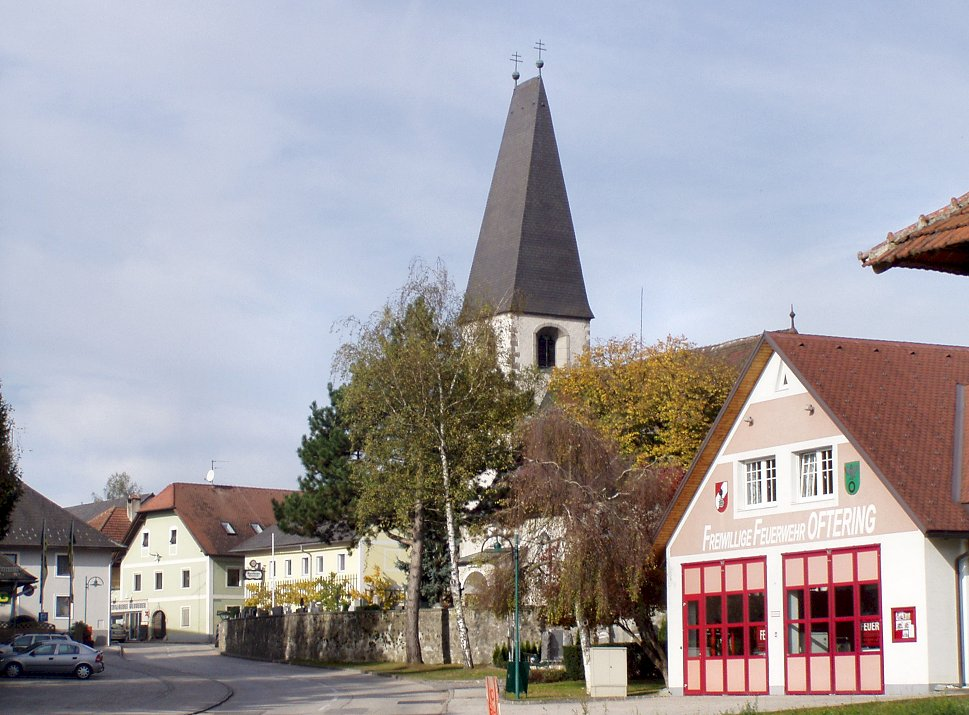 Oftering